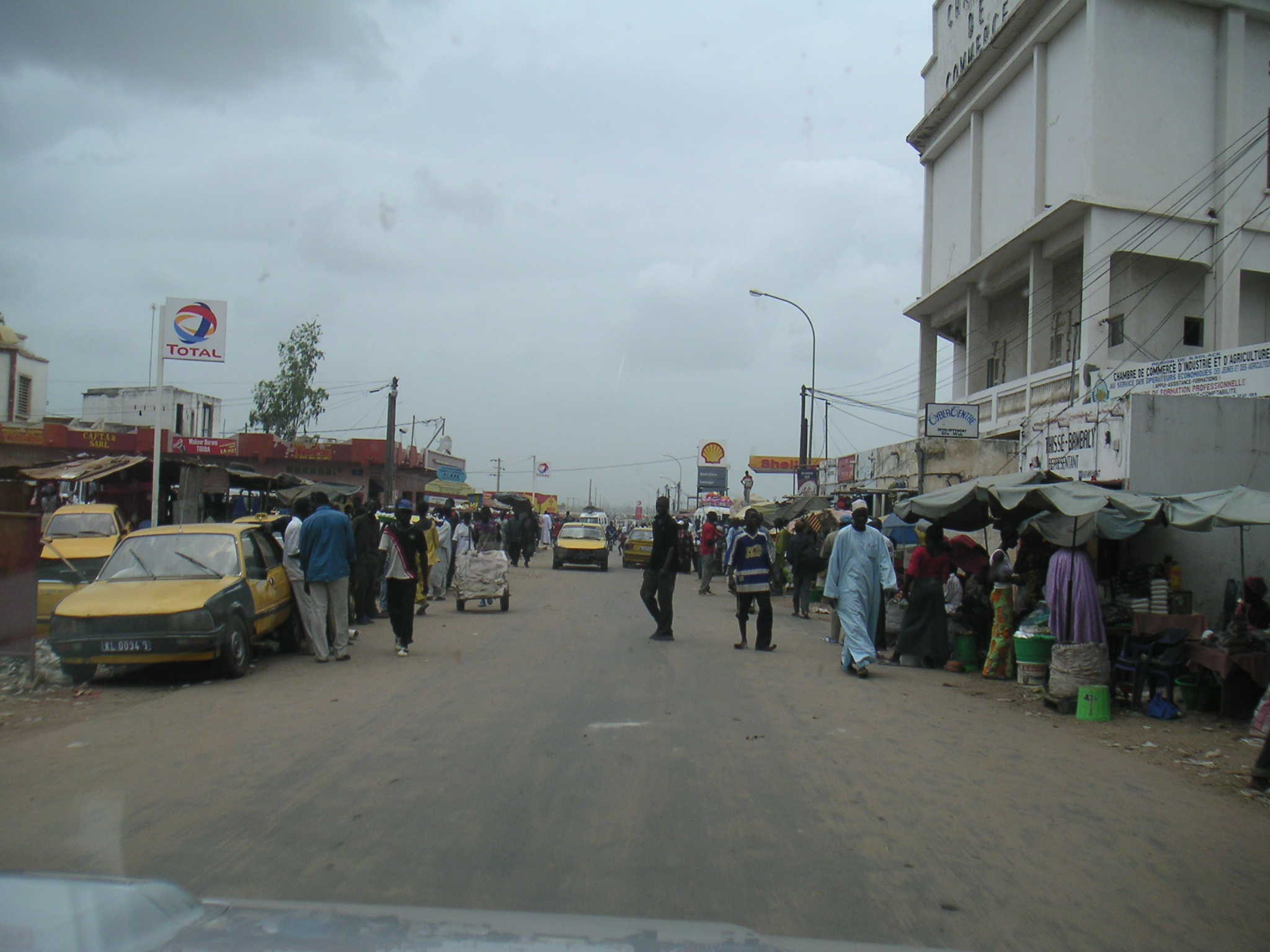 Une rue de Kaolack (Sénégal). A droite la Chambre de Commerce.